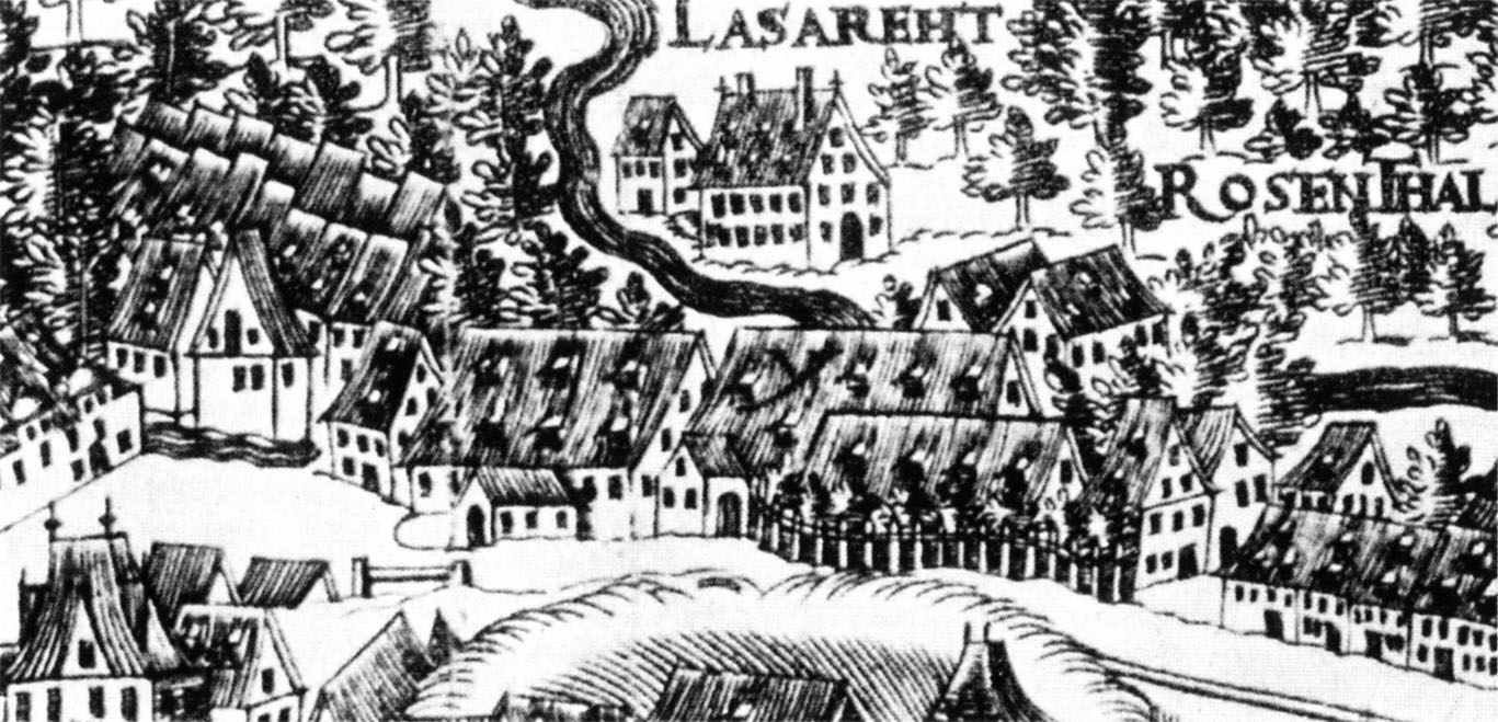 Hospital St. Georg vor dem Ranstädter Tor in Leipzig, im Vordergrund die Gebäude des HospitalsAusschnitt aus: Der Stadt Leiptzigk Abriß, Kupferstich von Conrad Knobloch, 1595